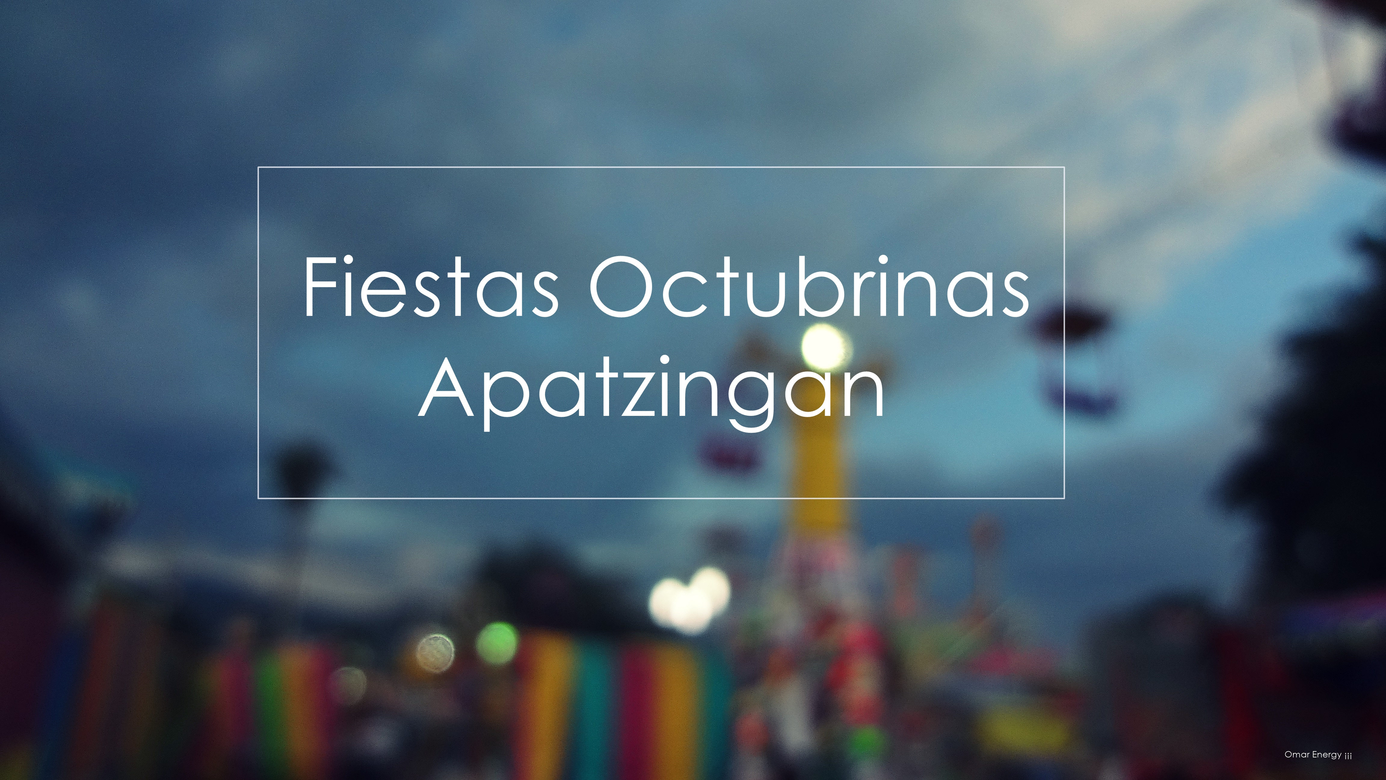 Fiestas Octubrinas de Apatzingan. Búscame en Facebook y en Youtube como; Omar Energy ¡¡¡ .